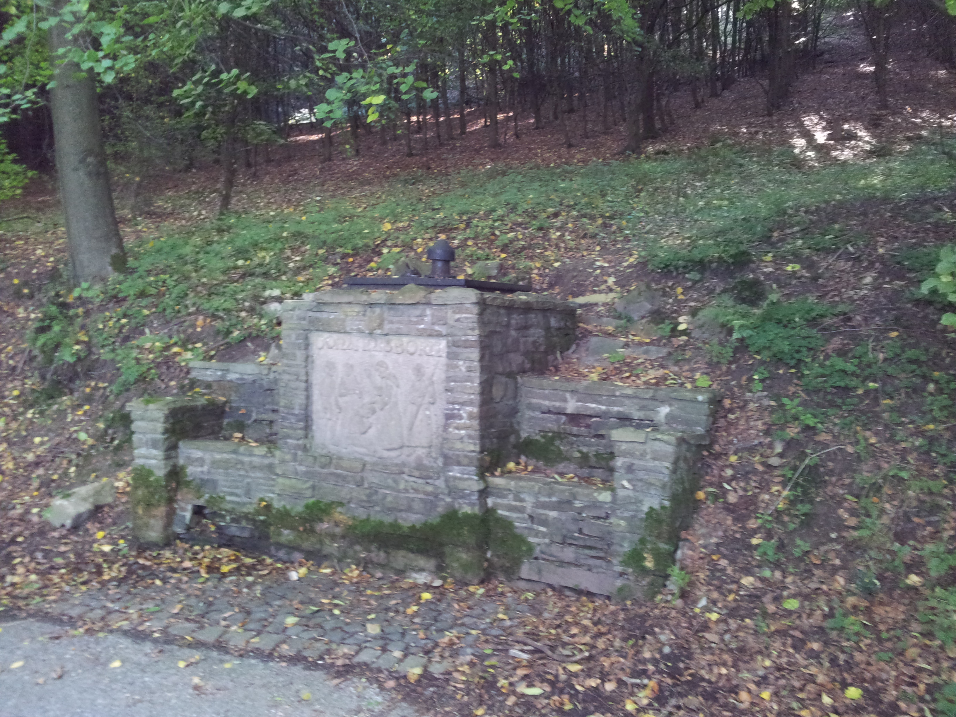 Johannisborn bei Wiblingwerde